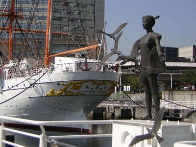 Heck der Nippon Maru